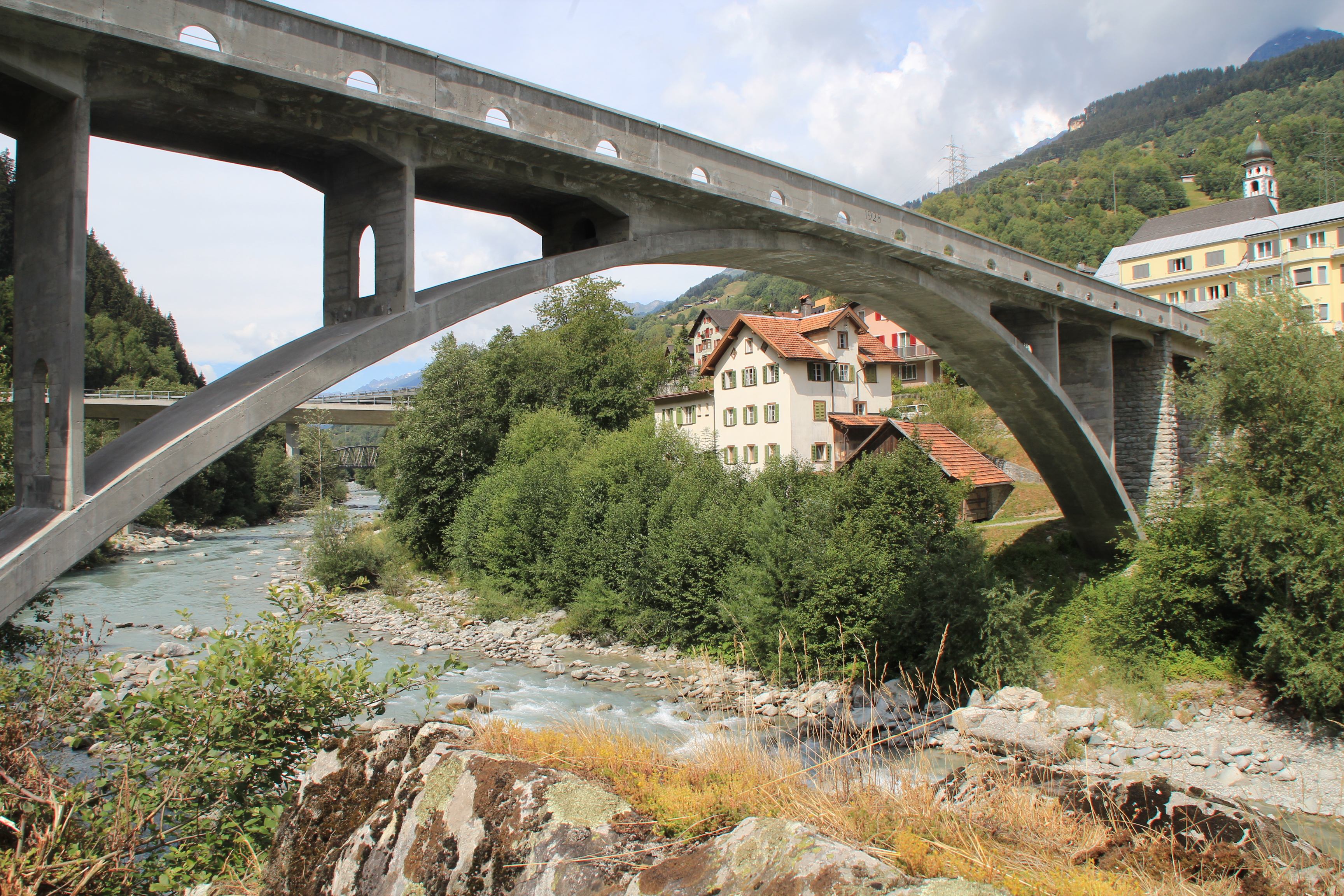 Vorderrheinbrücke von 1928 bei Tavanasa in der Surselva. Dieses Bauwerk ersetzt eine von Robert Maillart entworfene Brücke aus dem Jahr 1906, die 1927 durch einen Murgang zerstört wurde. Die Konstruktion ist stark von Maillart beeinflusst.